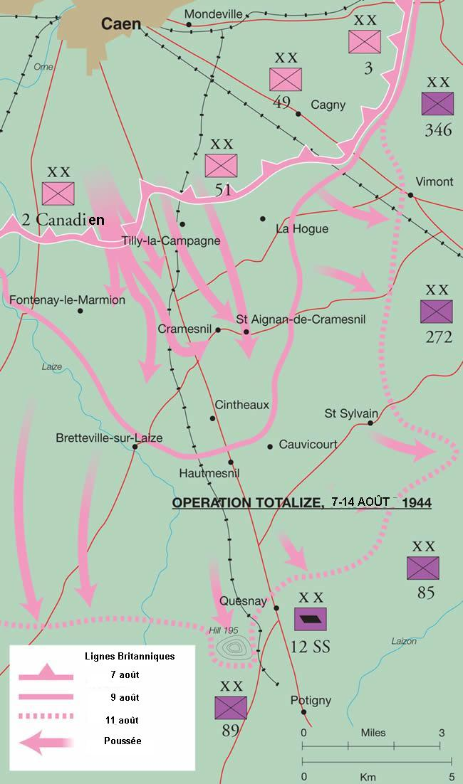 Poussée Alliée lors de l'Opération Totalize du 7 au 14 août 1944 pour déloger les Allemands de Falaise en Normandie.